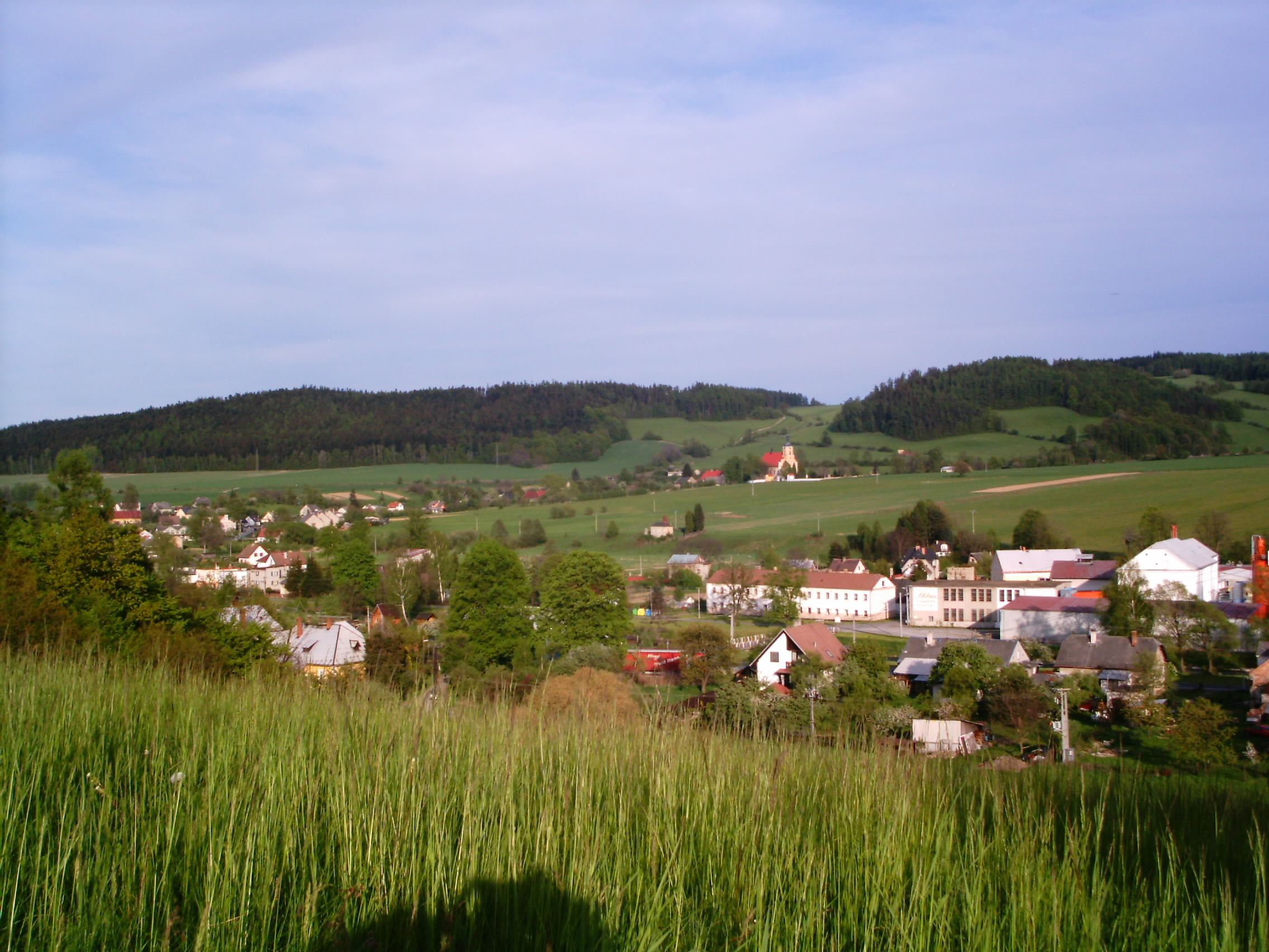 Vajca, Slovakia